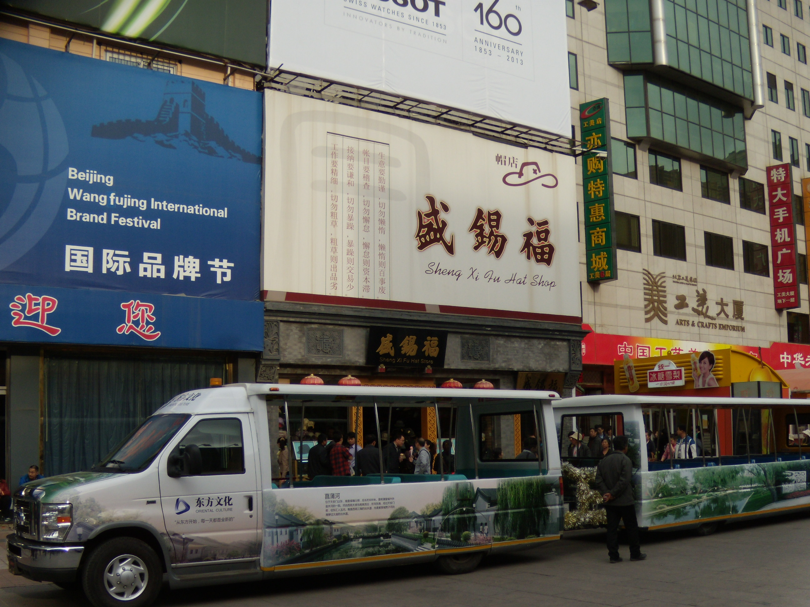 盛锡福门前的王府井游览车，位于王府井大街